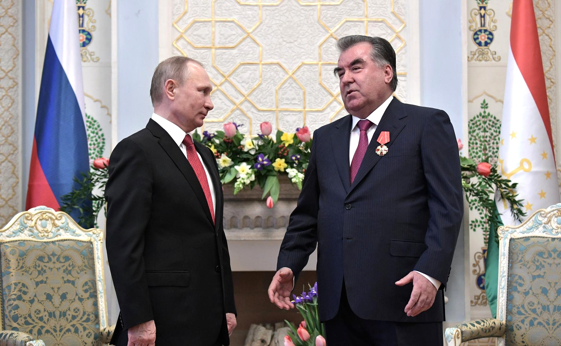 Президента России Владимира Путина с Президентом Таджикистана Эмомали Рахмоном. Владимир Путин вручил Президенту Таджикистана Эмомали Рахмону государственную награду Российской Федерации – орден Александра Невского